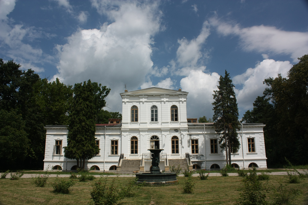 Palatul Ghica din Caciulati